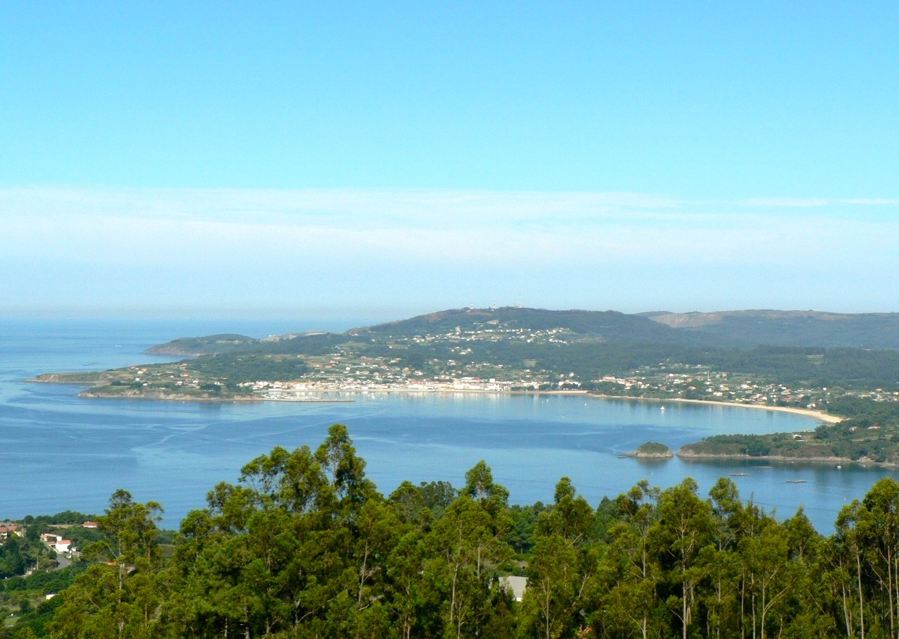 Vista da ria de Ares, panorámica